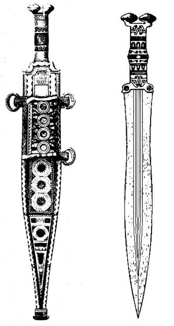 Espadas cortas con antenas atrofiadas procedentes de las necrópolis de «La Osera» y «Cardeñosa», ambas en la provincia de Ávila (España). Pertenecen a los inicios de la Segunda Edad del Hierro, Cultura de las Cogotas-II